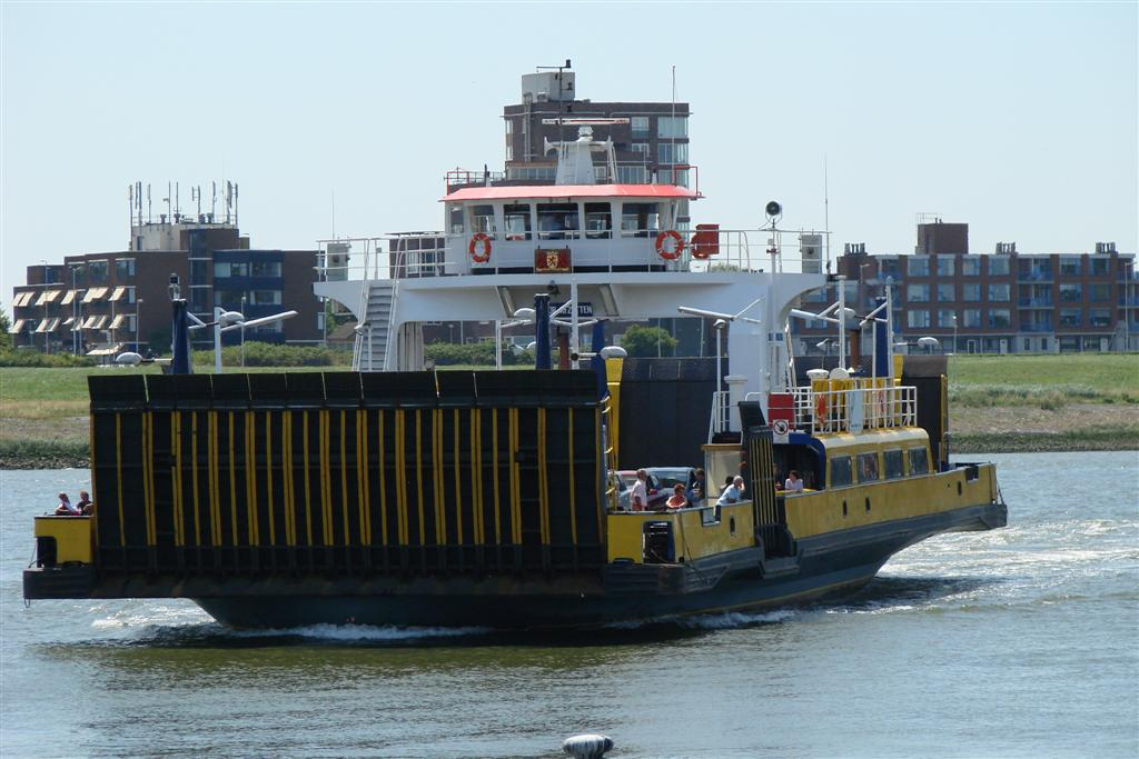 Ferry Maassluis-Rozenburg